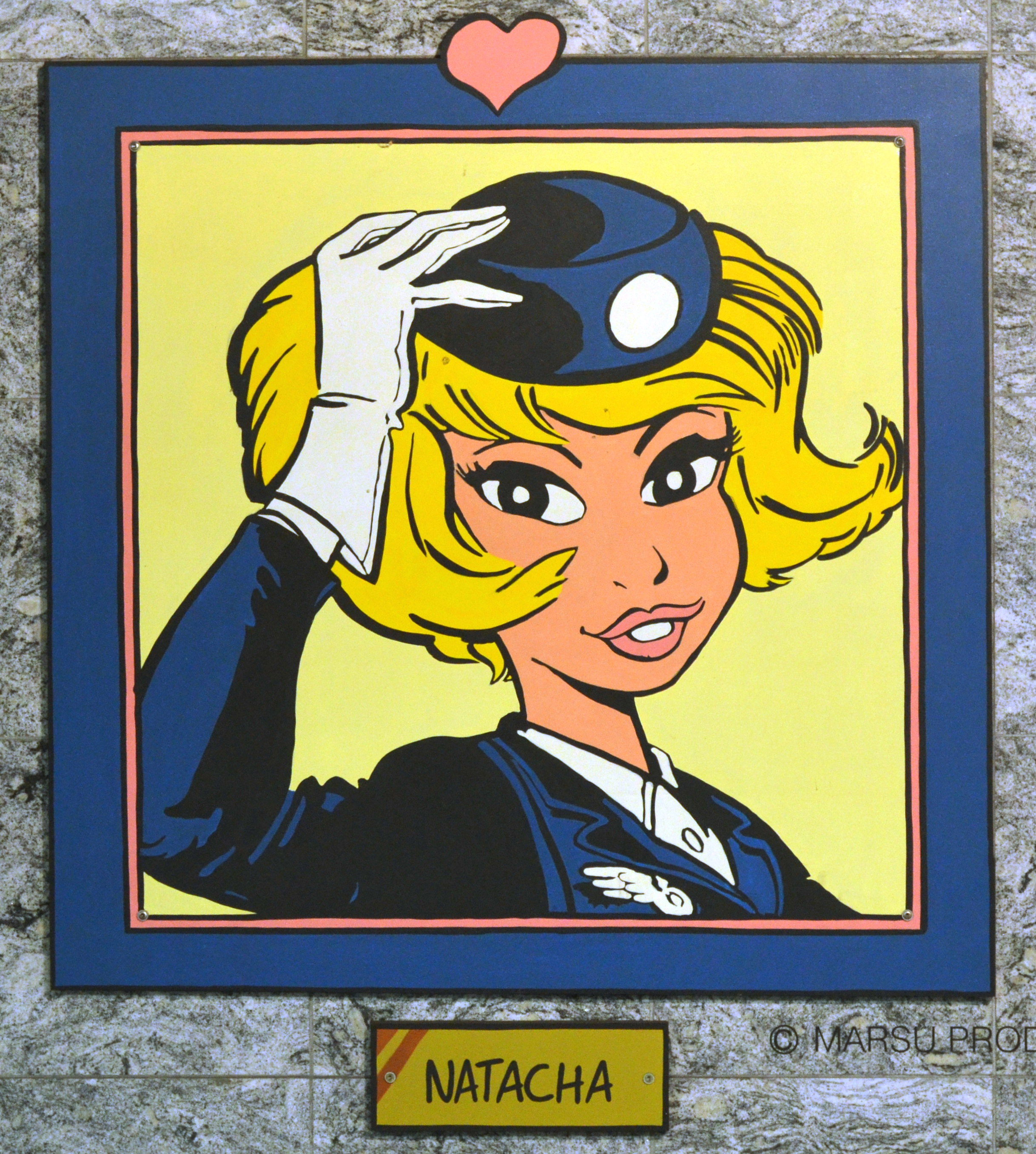 Charleroi (Belgique) - Station Janson du métro léger. Natacha.